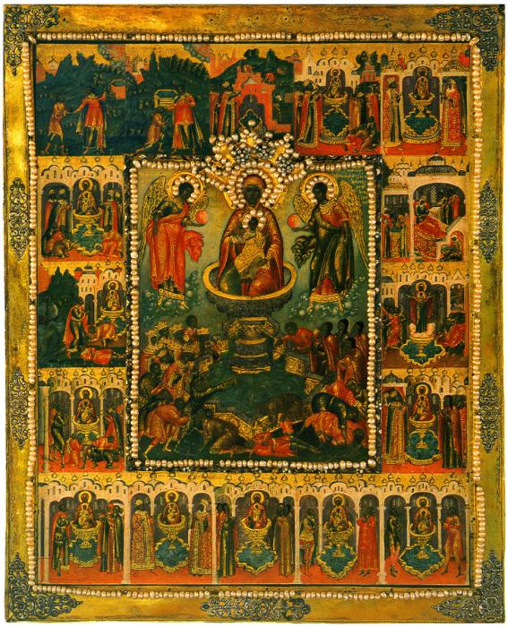 Богоматерь Живоносный Источник, с 16 клеймами чудес. 1670 г. МНДМ. 53x49 см.